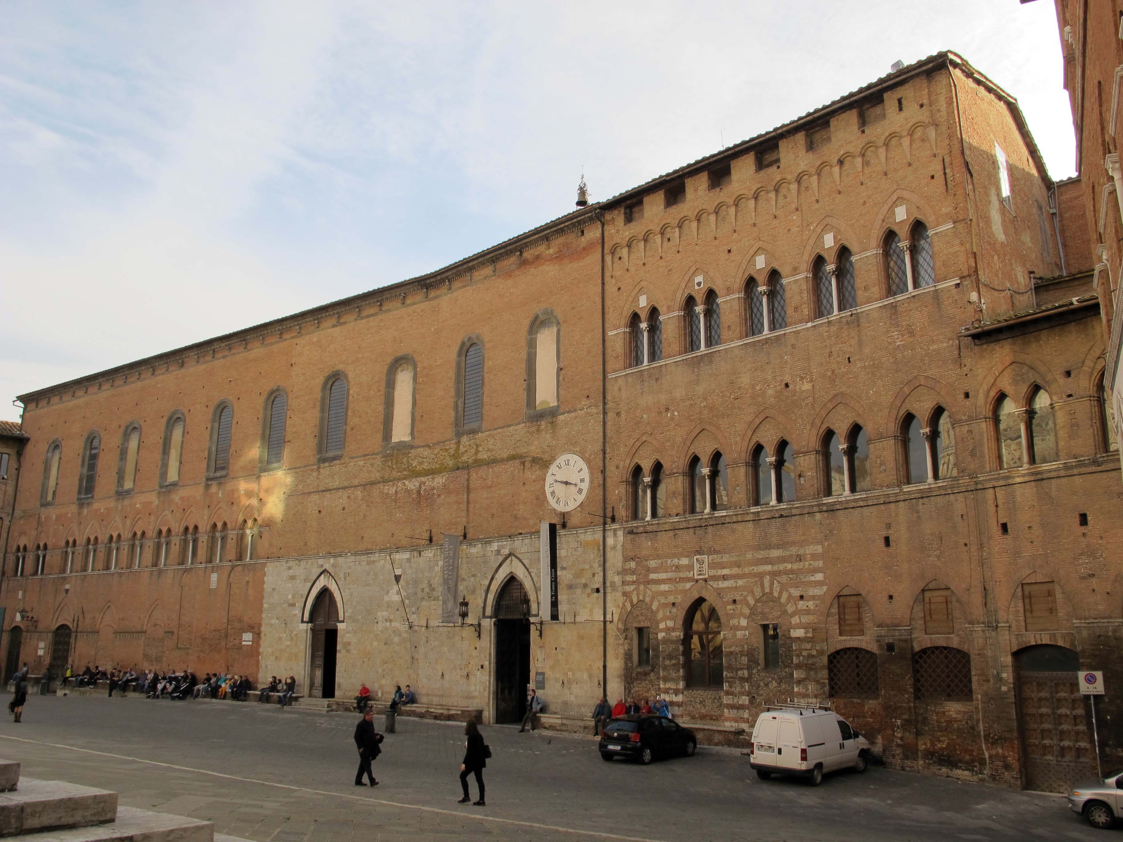 Siena, piazza del Duomo e dintorni